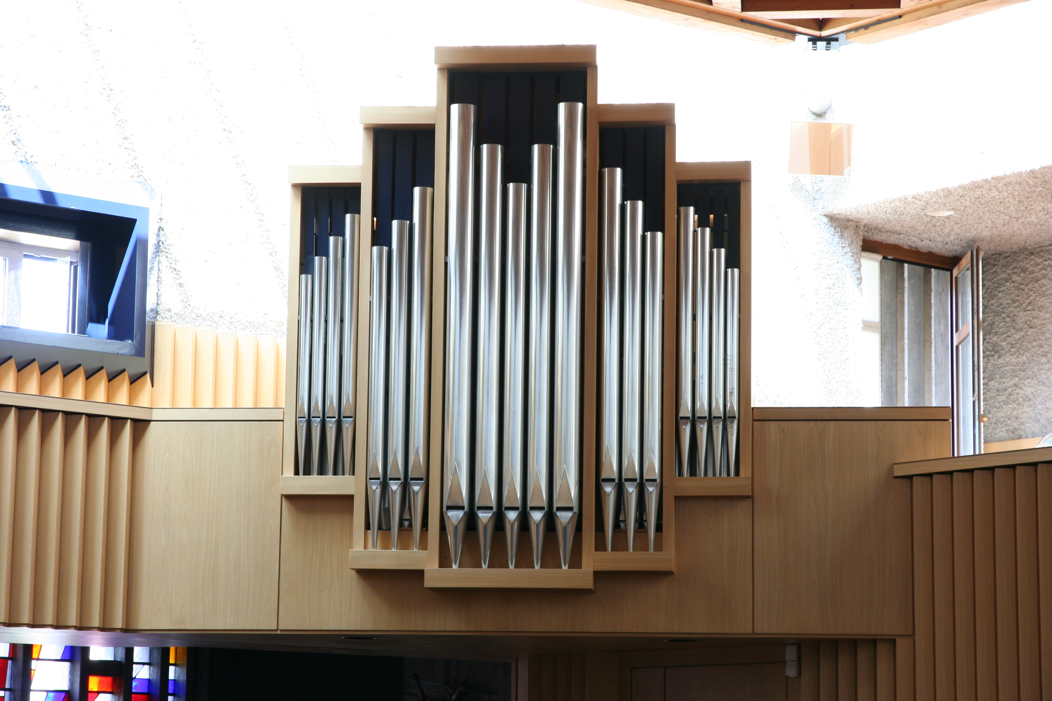 Römisch-katholische Kirche St. Agnes Erlenbach ZH